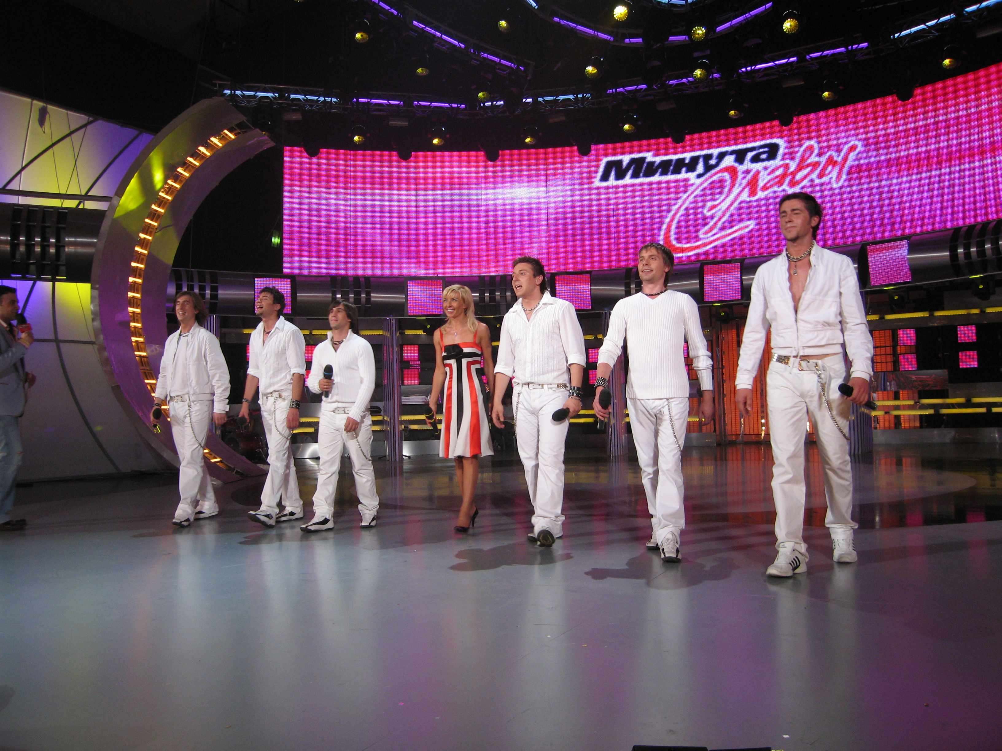 Вокальная группа DukeTime выступила на гала-концерте шоу "Минута Славы" (1-й сезон) на Первом российском телеканале вместе с Татьяной Овсиенко